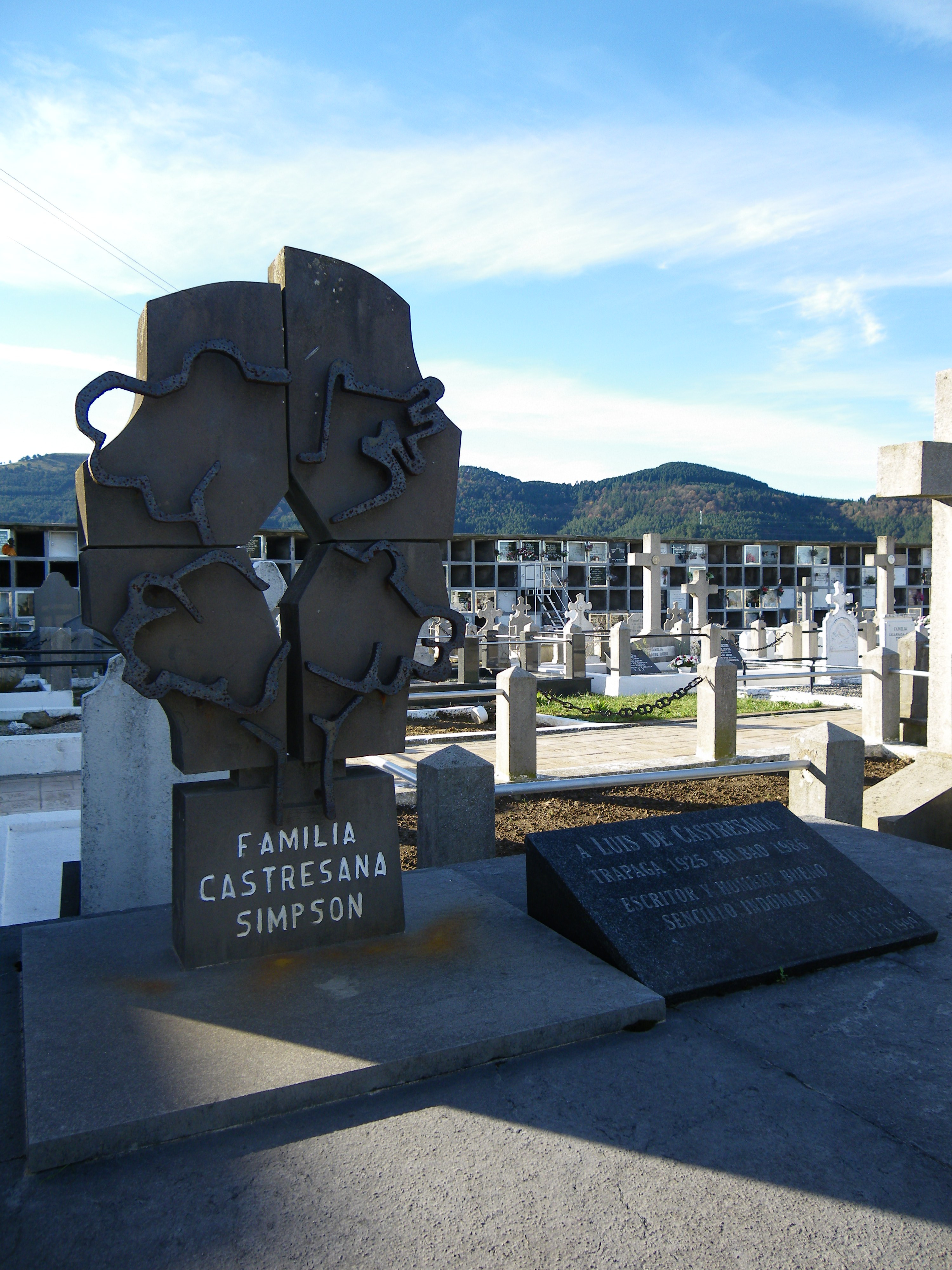 Luis de Castresana Rodriguez idazlearen omenezko hilarria, Nestor Basterretxea Artzadunek egindakoa. Trapagarango hilerria, Zugaztieta, Trapagaran, Meatzaldea, Bizkaia, Euskal Herria.